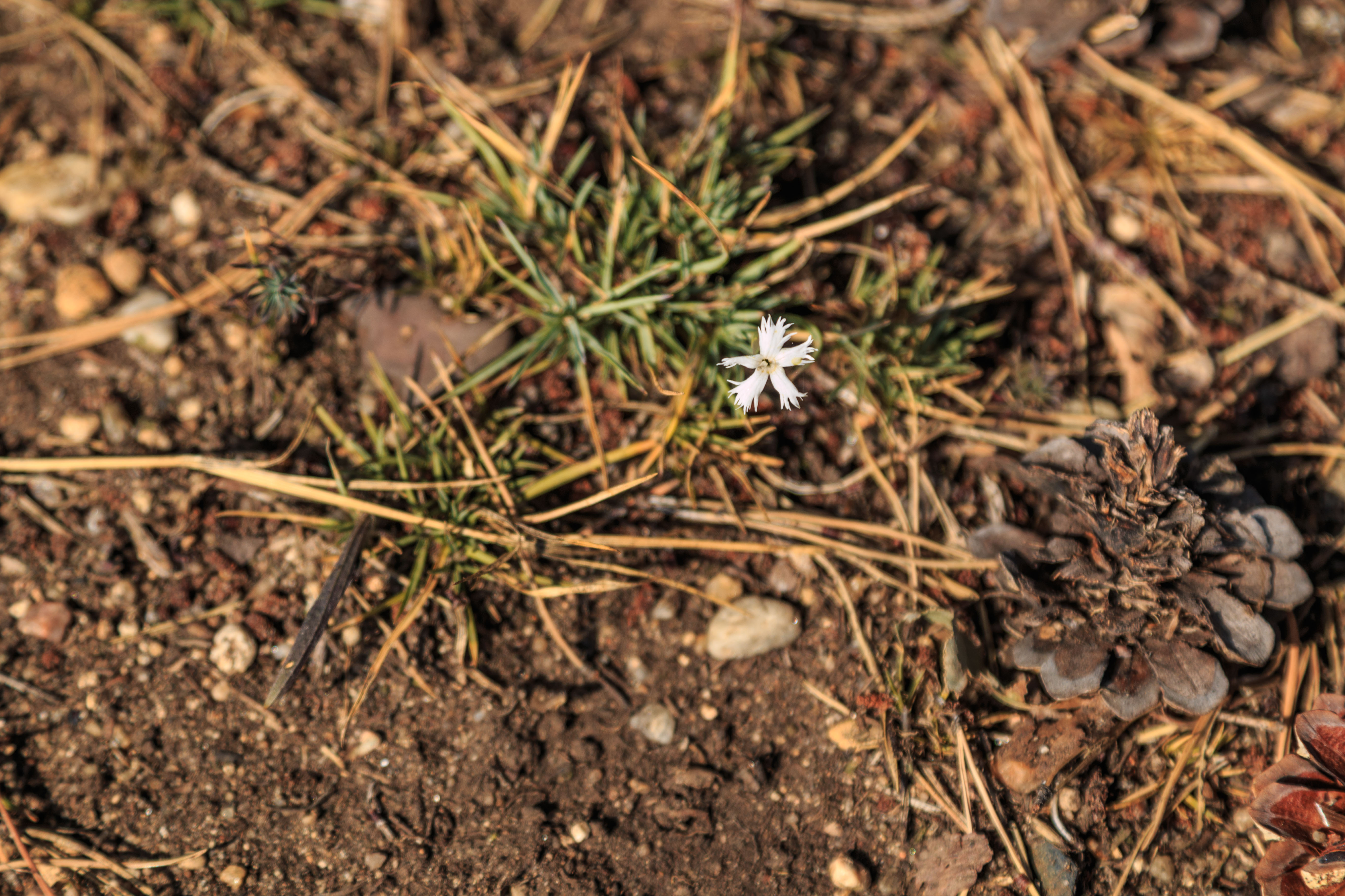 hvozdík písečný český v NPP Kleneč Project: Chráněná území.